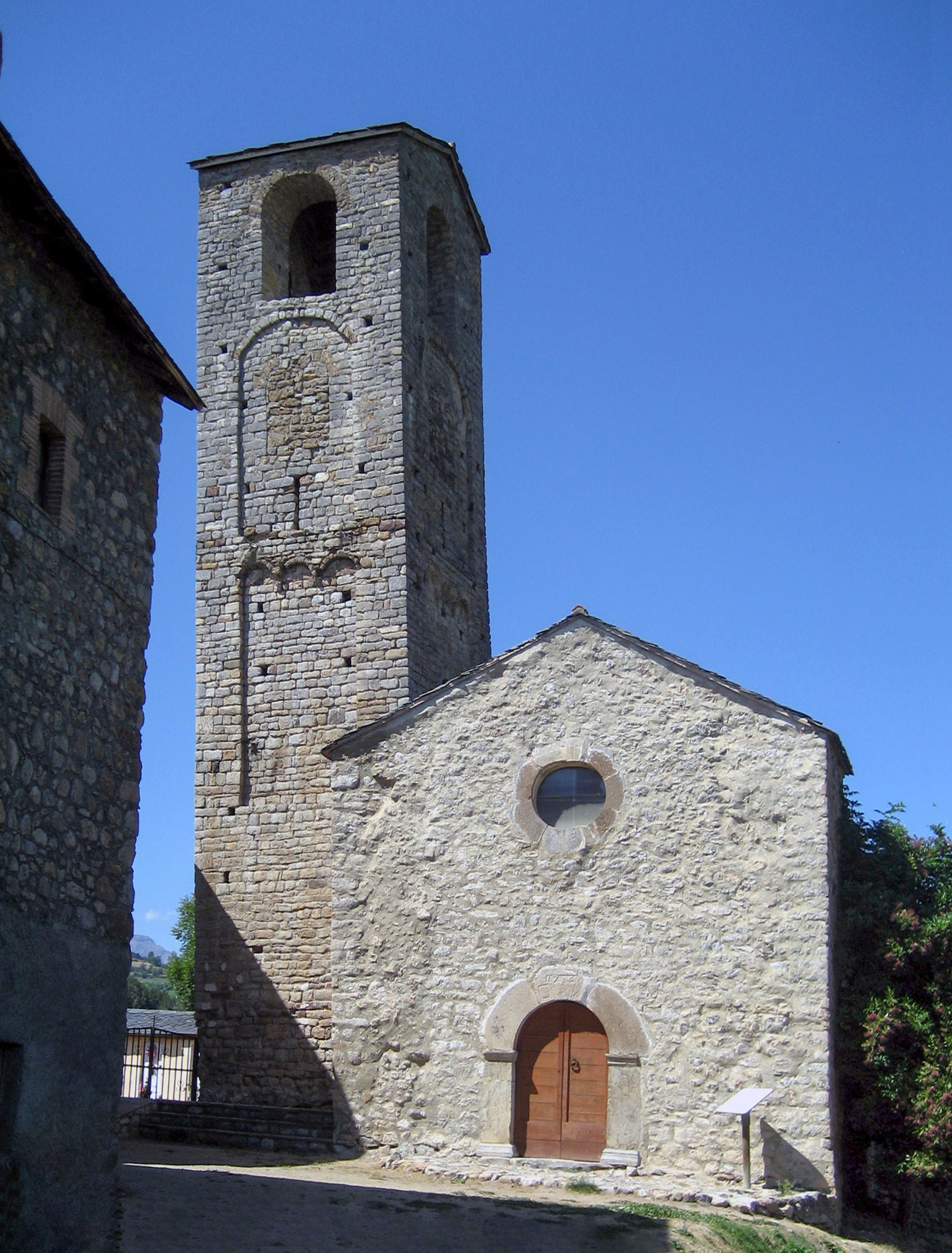 Església romànica de Santa Eugènia de Nerellà a la Baixa Cerdanya. Catalunya.